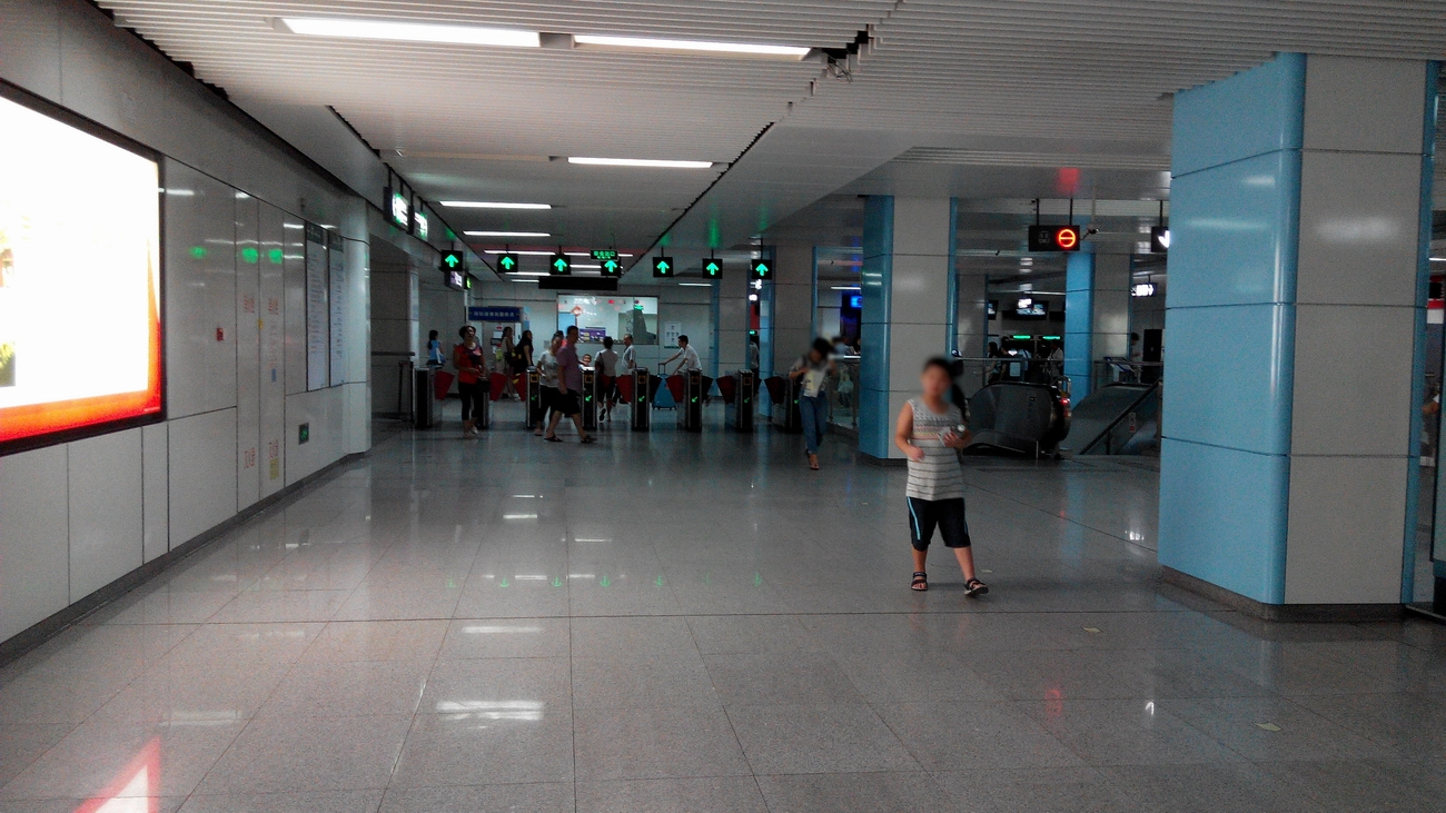 深圳地铁5号线灵芝站站厅